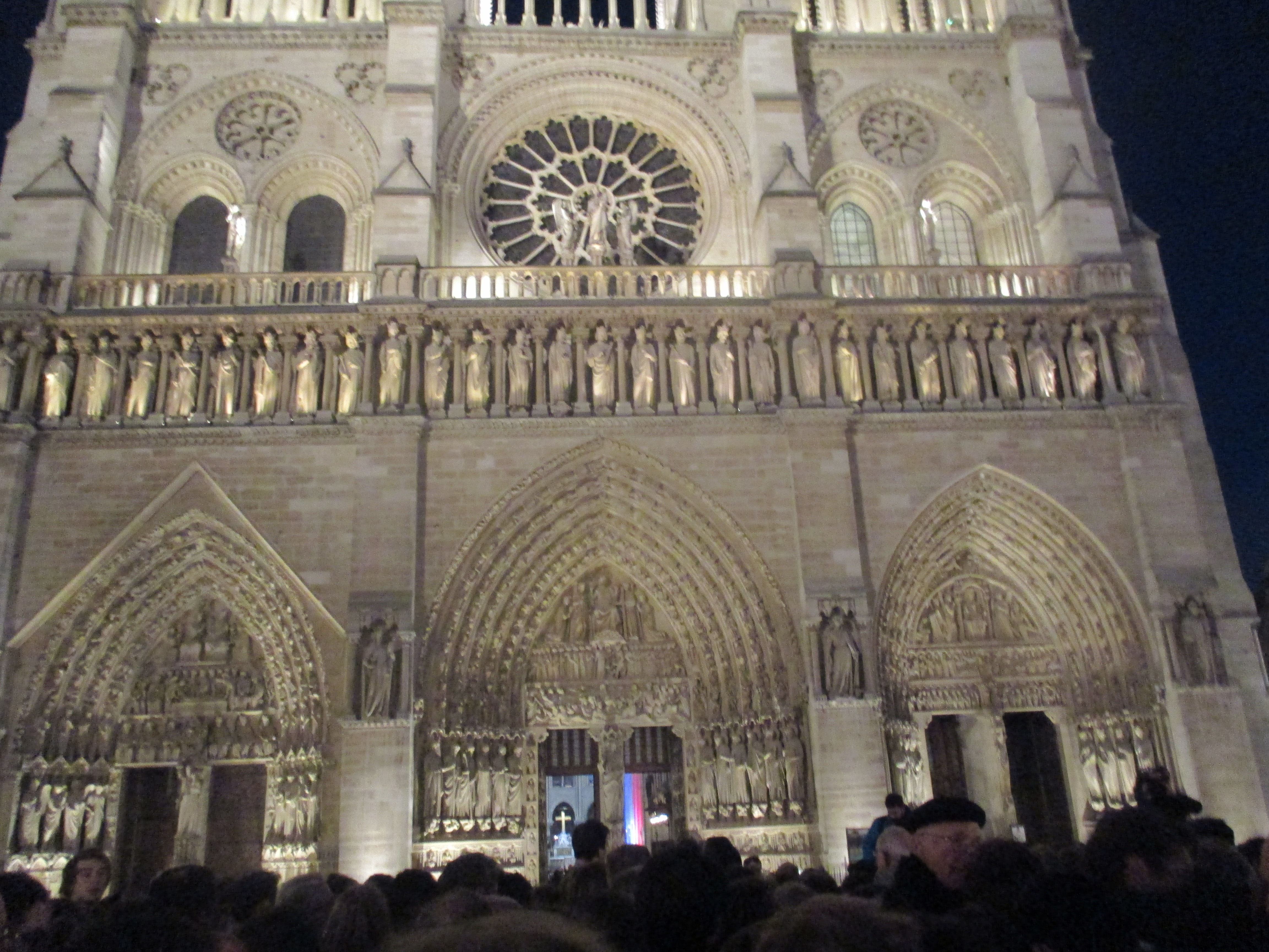 Messe à Notre-Dame de Paris le dimanche 15 novembre 2015 pour les victimes des attentats du 13 novembre 2015 et pour la France.